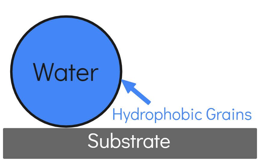 疏水粒子的性質，使用Autodraw